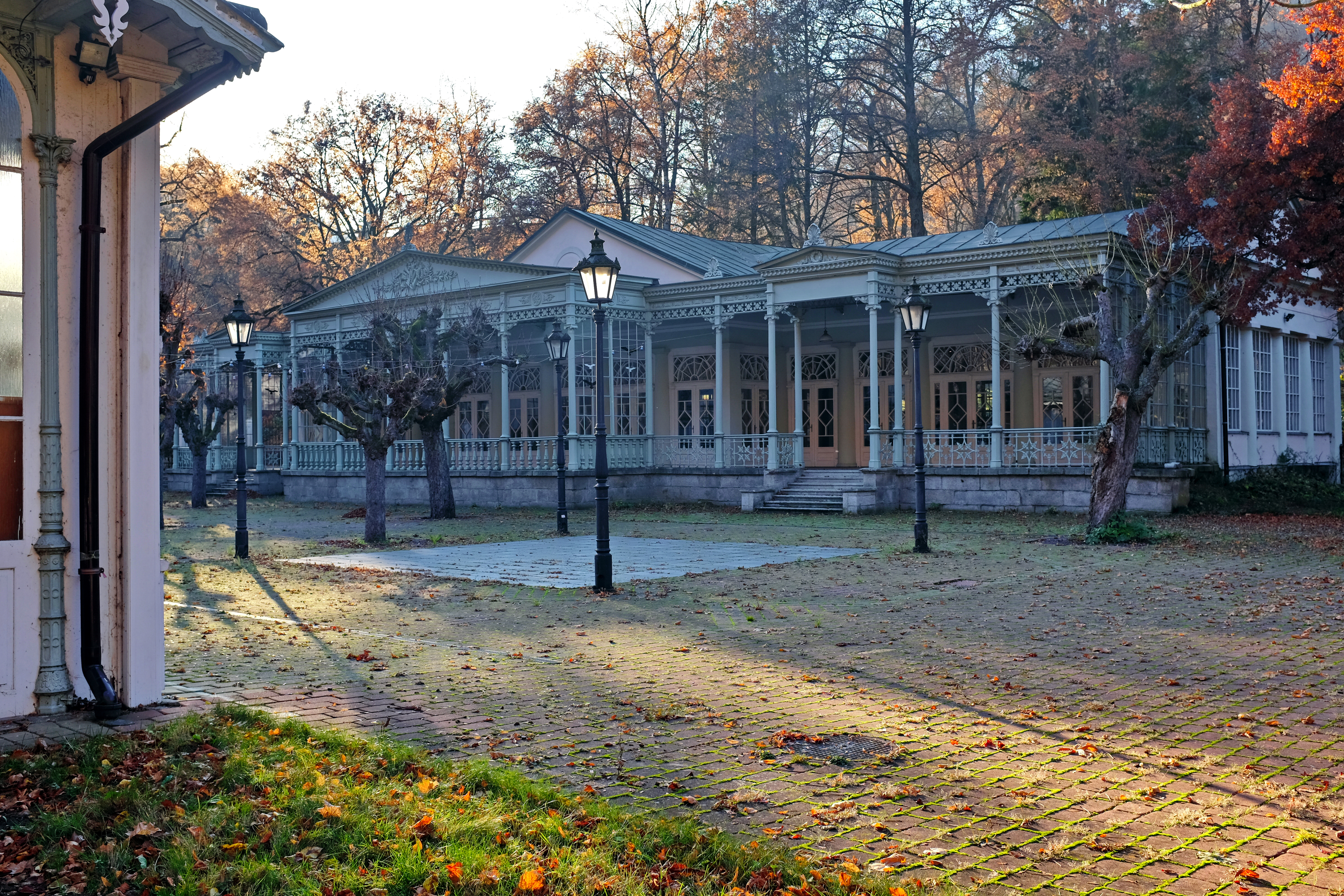 Poštovní dvůr, Slovenská 309/2, Karlovy Vary.